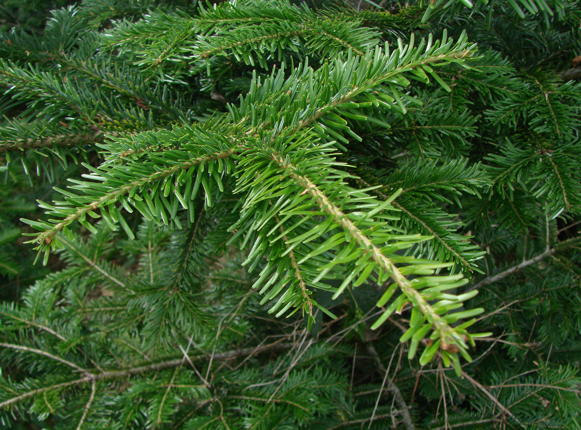 Abies alba.